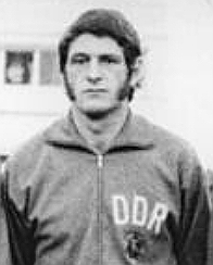 Title: Berlin, DDR-Fußball-Nationalmannschaft People in the image: Sparwasser, Jürgen: Fußballnationalspieler, 1. FC Magdeburg, Olympiade 1972, DDR (GND 136159745) Factual corrections and alternative descriptions are encouraged separately from the original description. Additionally errors can be reported at this page to inform the Bundesarchiv. Original historic description: ADN-ZB Mittelstädt 8.5.74 Berlin: Fußball-Länderspiel DDR gegen Belgien 1:0 im Jahn-Stadion am 13.3.1974. Die DDR-Elf. Obere Reihe von links: Mannschaftskapitän Bernd Bransch, Hans-Bert Matoul, Rüdiger Schnuphase, Joachim Fritsche, Joachim Streich und Konrad Weise. Untere Reihe von links: Eberhard Vogel, Torwart Jürgen Croy, Jürgen Sparwasser, Lothar Kurbjuweit und Reinhard Lauck.